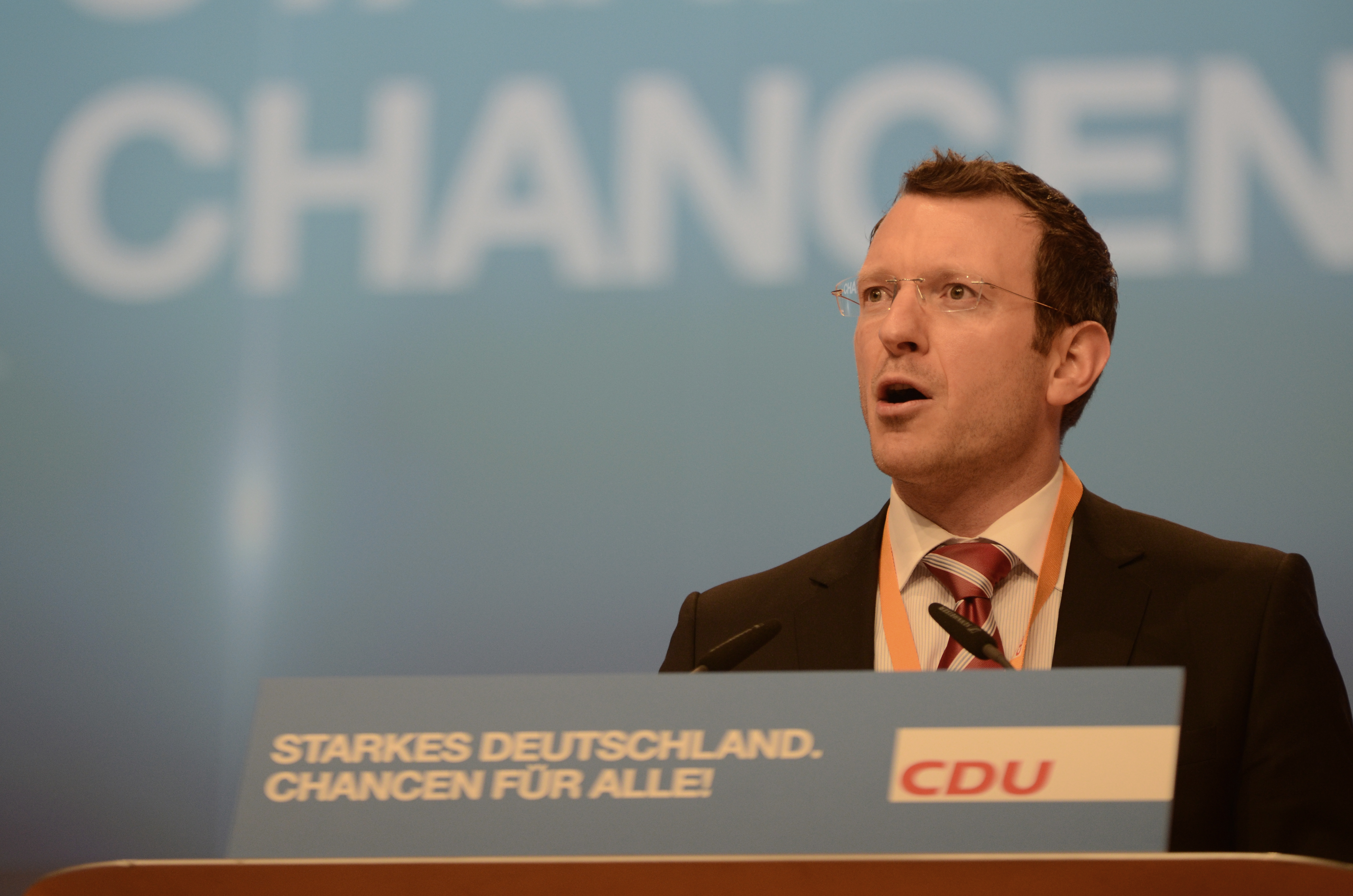 Jan-Marco Luczak auf dem CDU-Parteitag